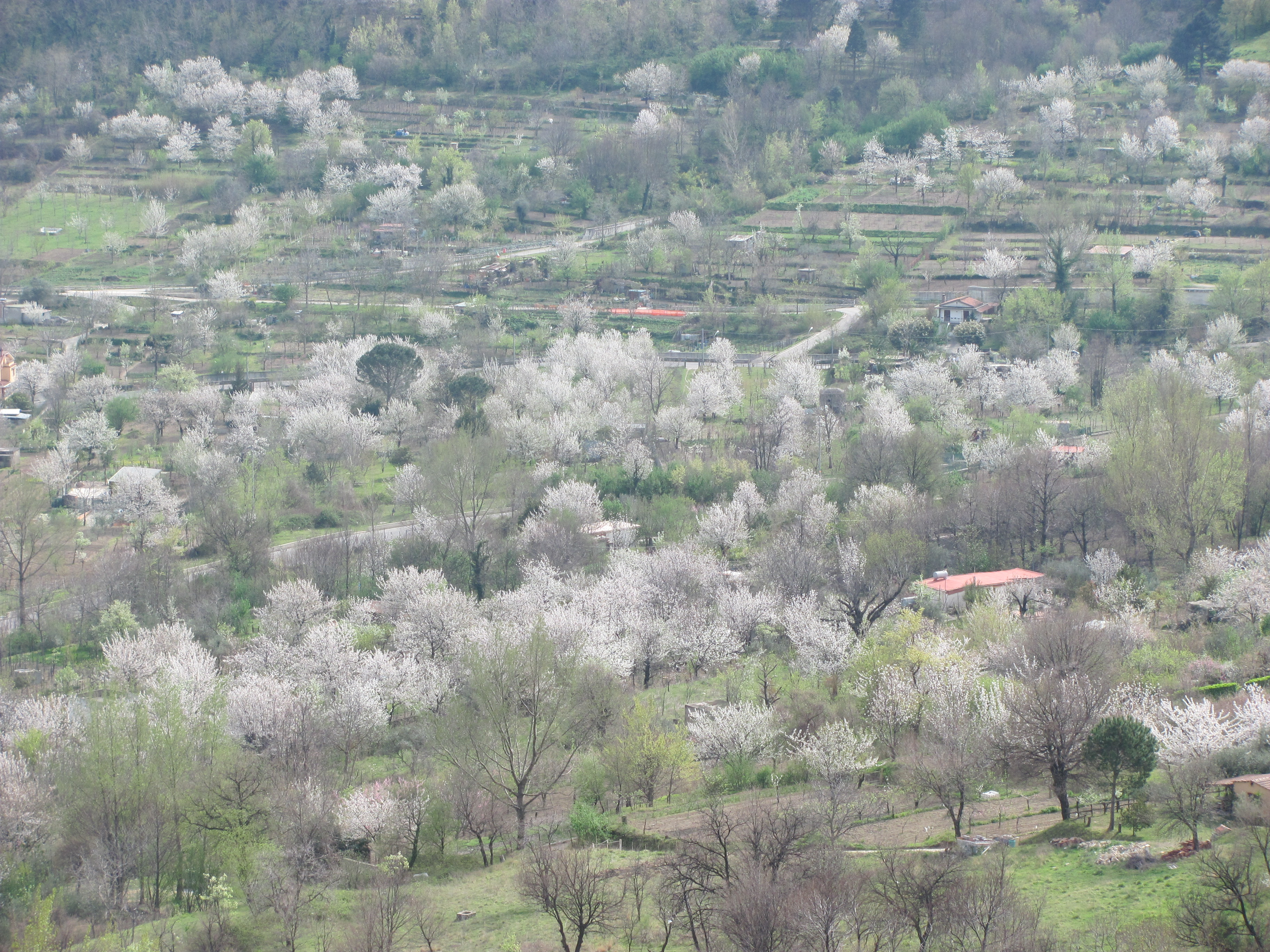 Siano (SA), Italia, Ciliegi in fiore, Bosco Borbone, dettaglio